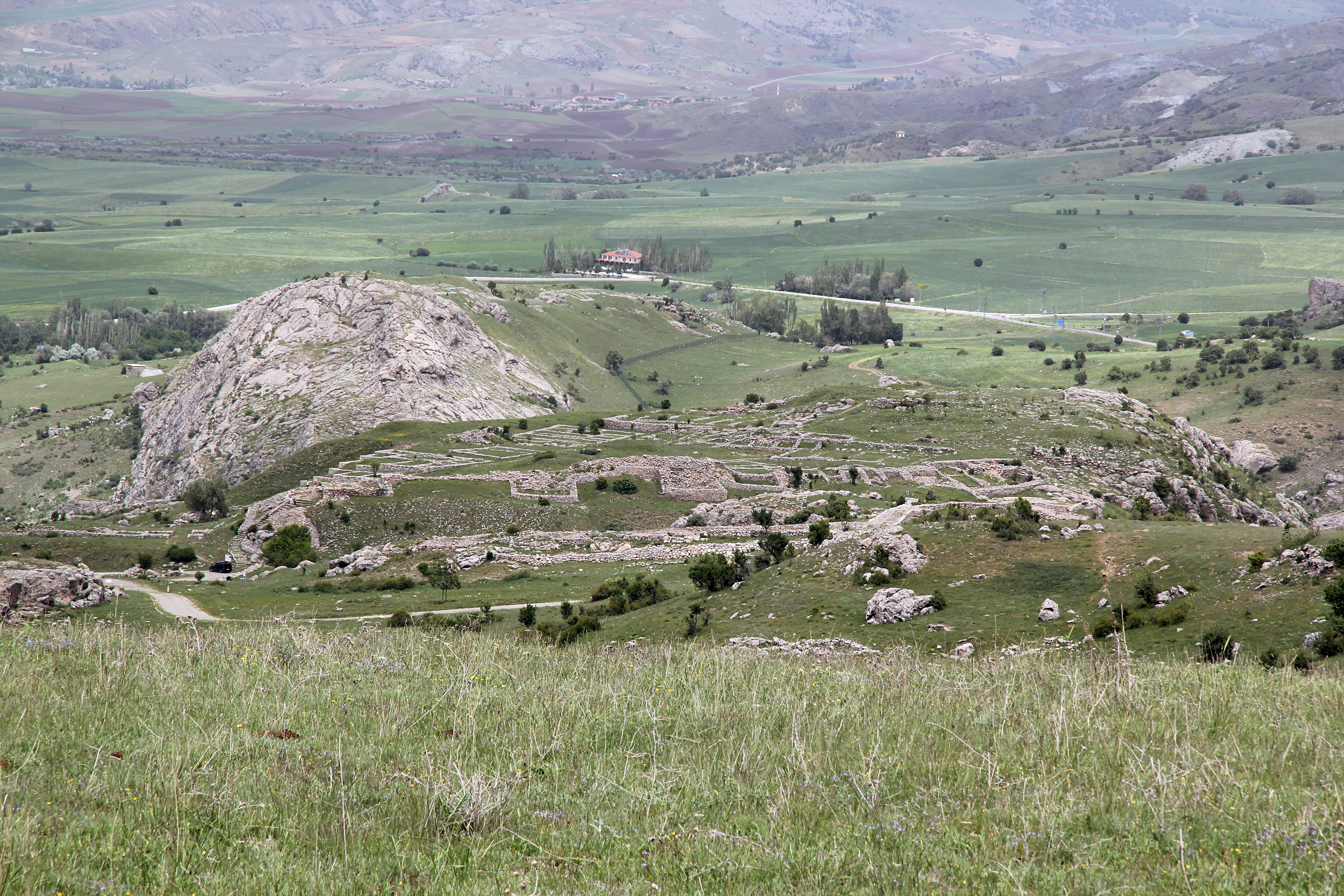 Büyükkale, die Zitadelle der hethitischen Hauptstadt Hattuša bei Boğazkale, Zentraltürkei, Ansicht von Süden, dahinter Ambarlıkaya und Büyükkaya